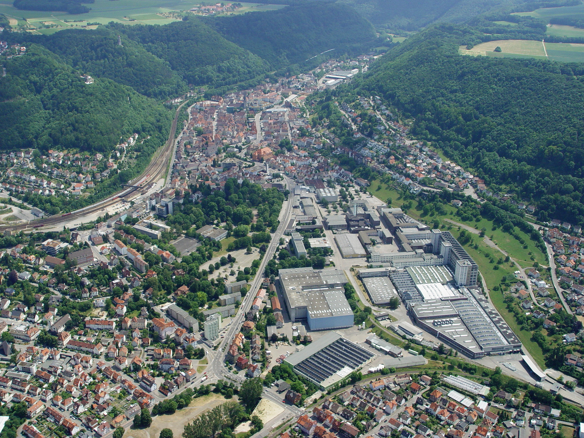 Blick auf die Altstadt von Norden über das Gelände der WMF. links im Bild Burg Helfenstein und Geislinger Steige